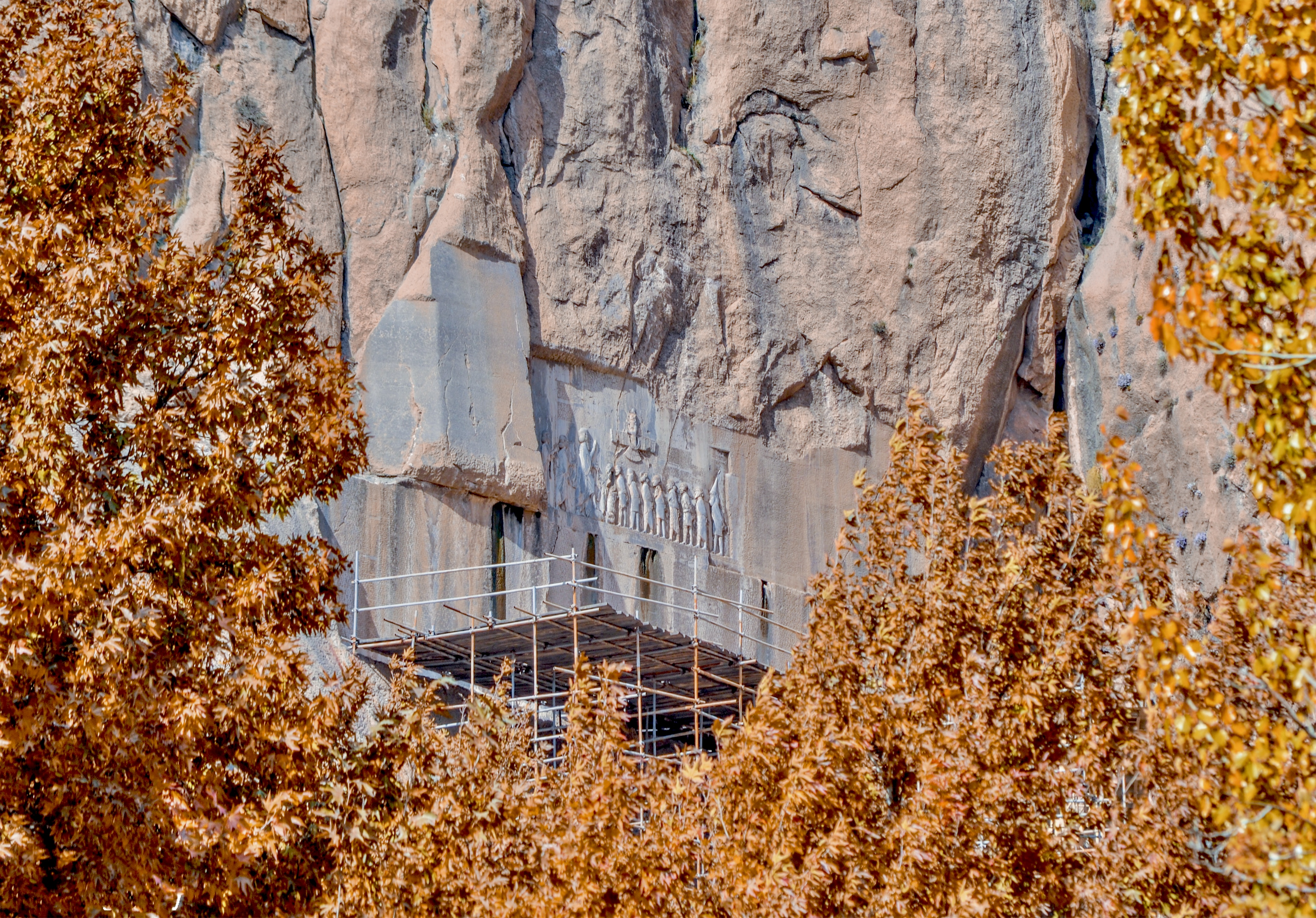 کتیبه داریوش بیستون عکاس : سهیل چهری